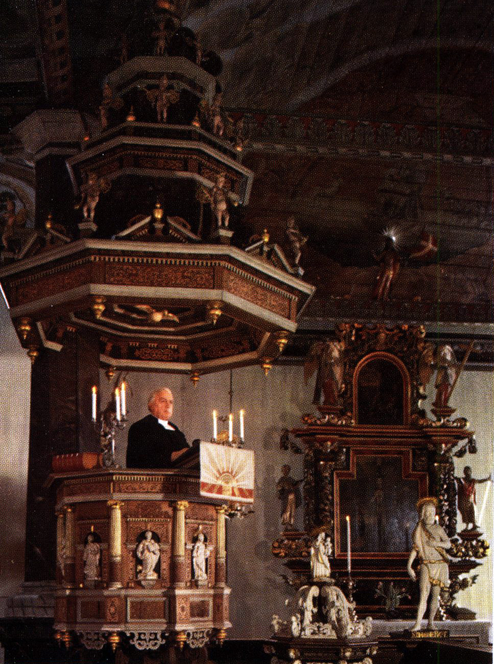 Kungälvs kyrka. Interiör med predikstol och altarprydnad